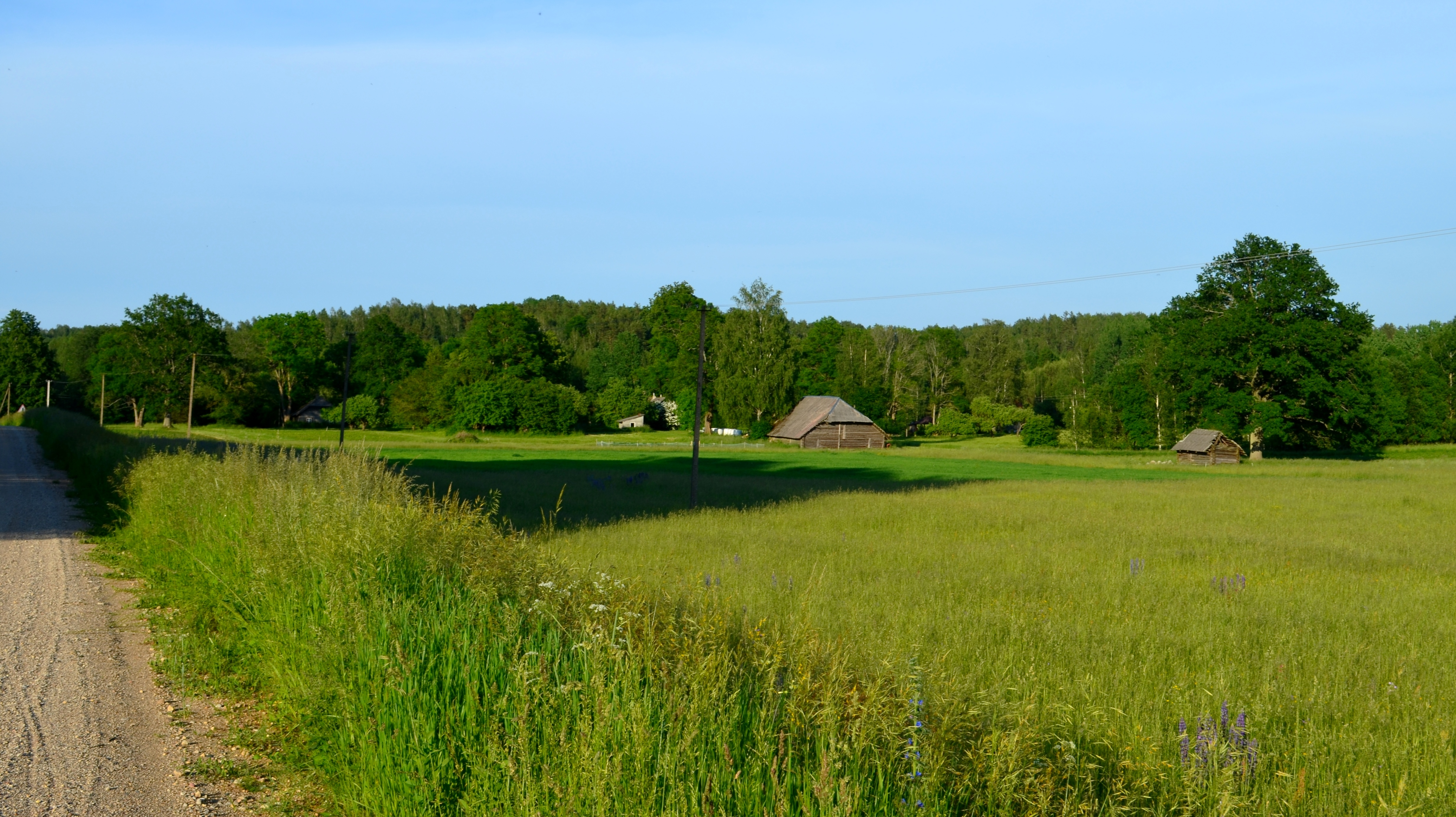 Tolimėnai, Salako sen., Zarasų r.